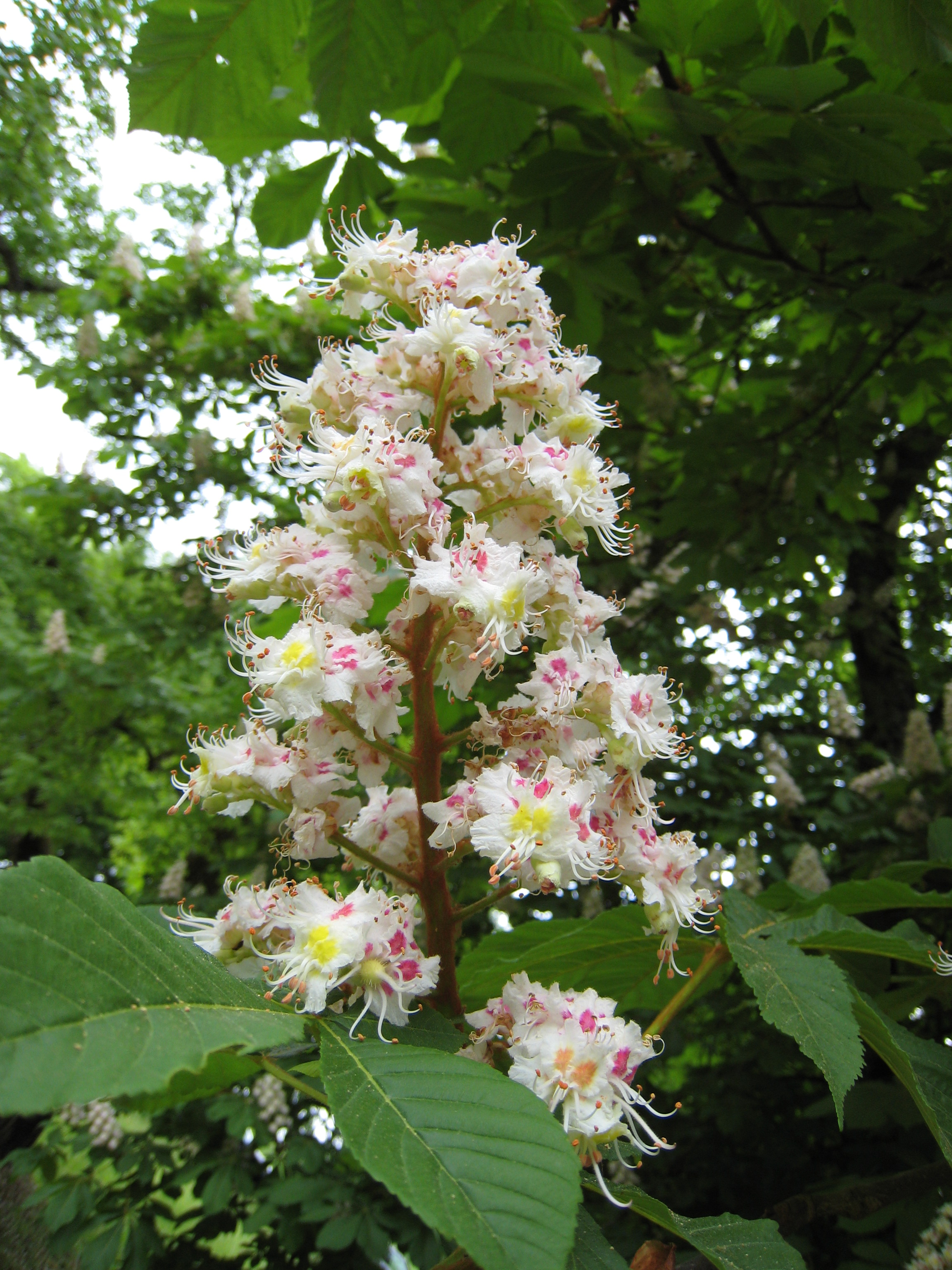 Fleur de maronnier